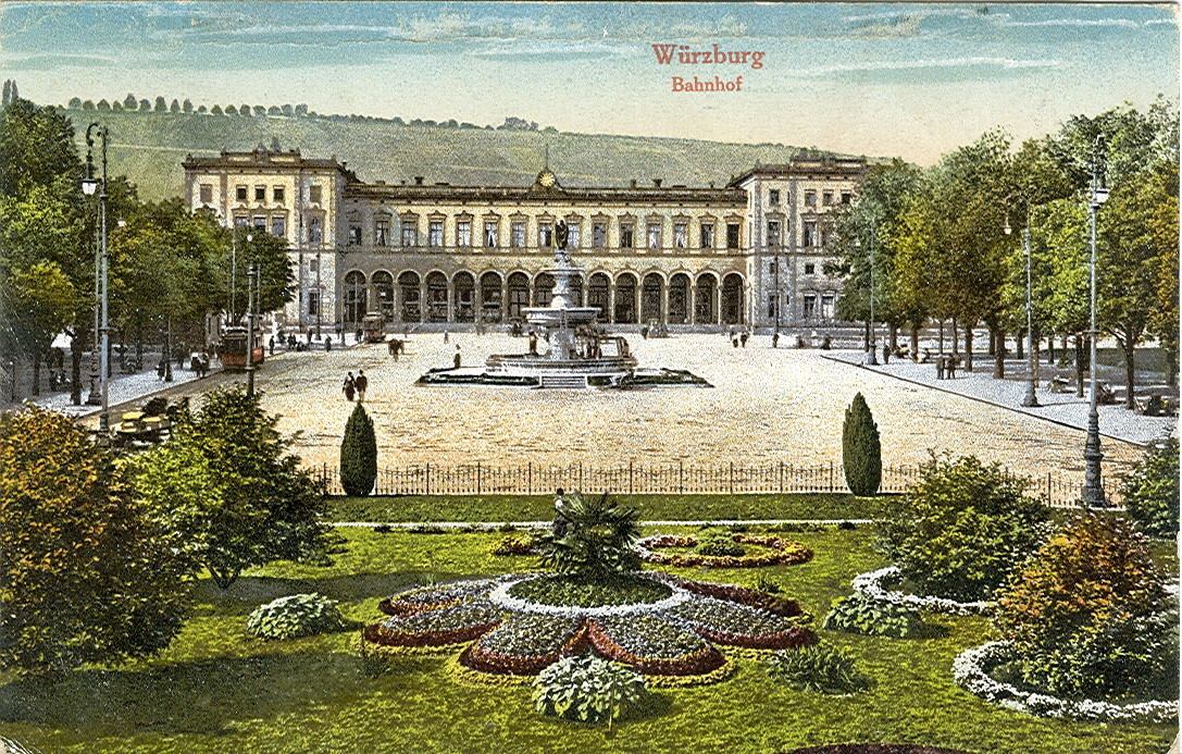 Postkarte, datiert 20.5.1919. Beschriftung: "Würzburg - Bahnhof".